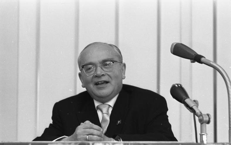 65. Geburtstag von Staatssekretär a.D. Dr. Wandersleb Feier im Königshof, Bonn